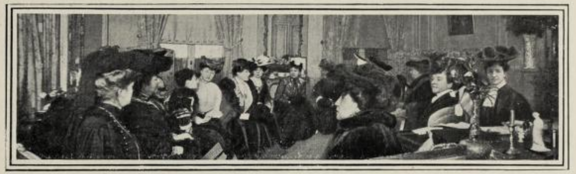 photographie du jury vie heureuse dans le salon d’Anna de Noailles, Paris, Hachette, 1904